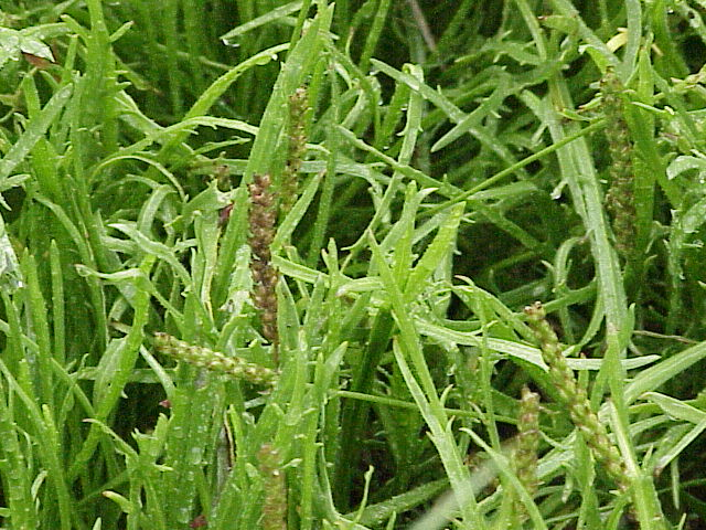 Species: Plantago coronopus Family: Plantaginaceae Image No. 1